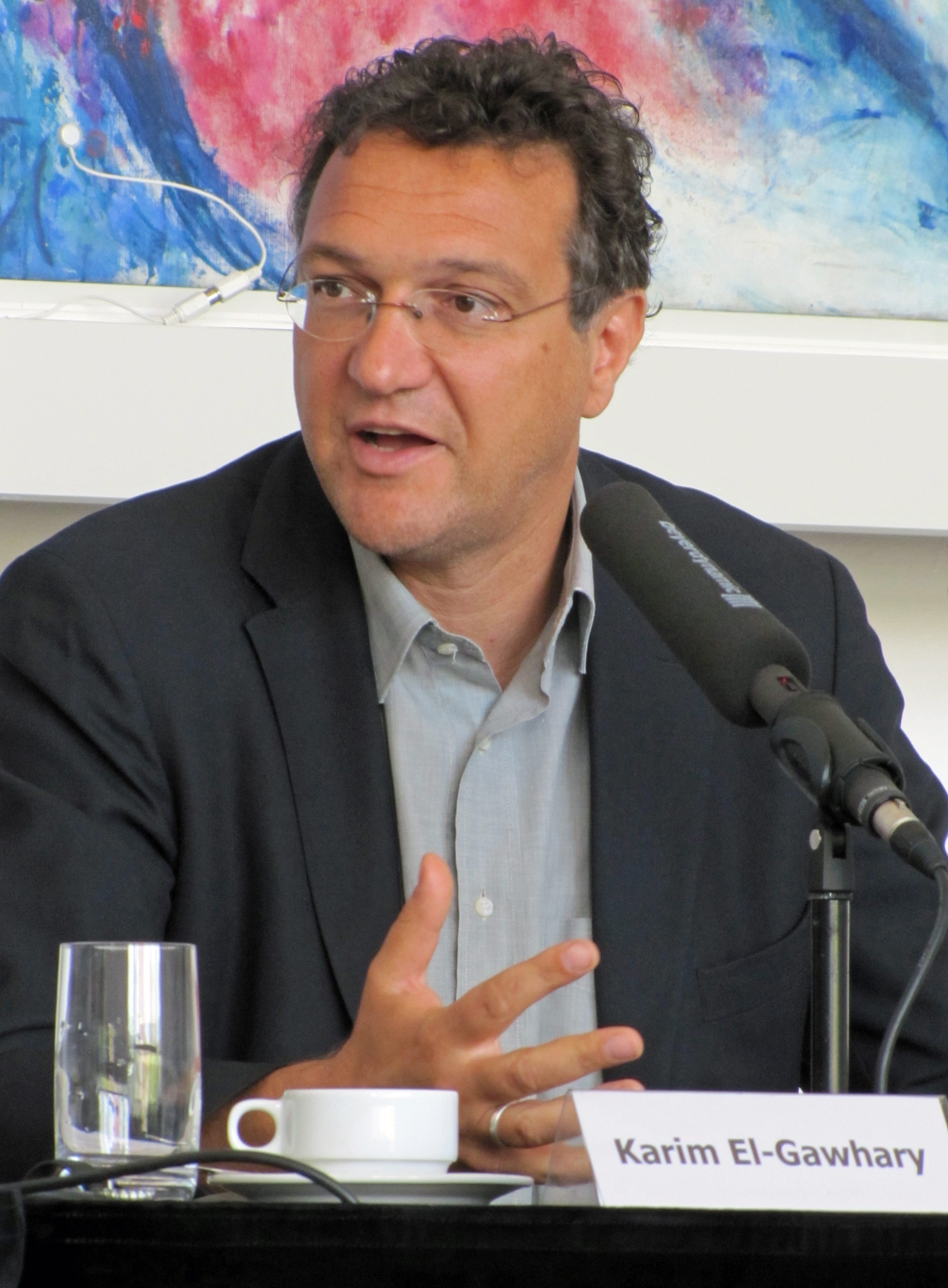 Karim El-Gawhary, 2012 bei den Roemerberggespraechen in Ffm.